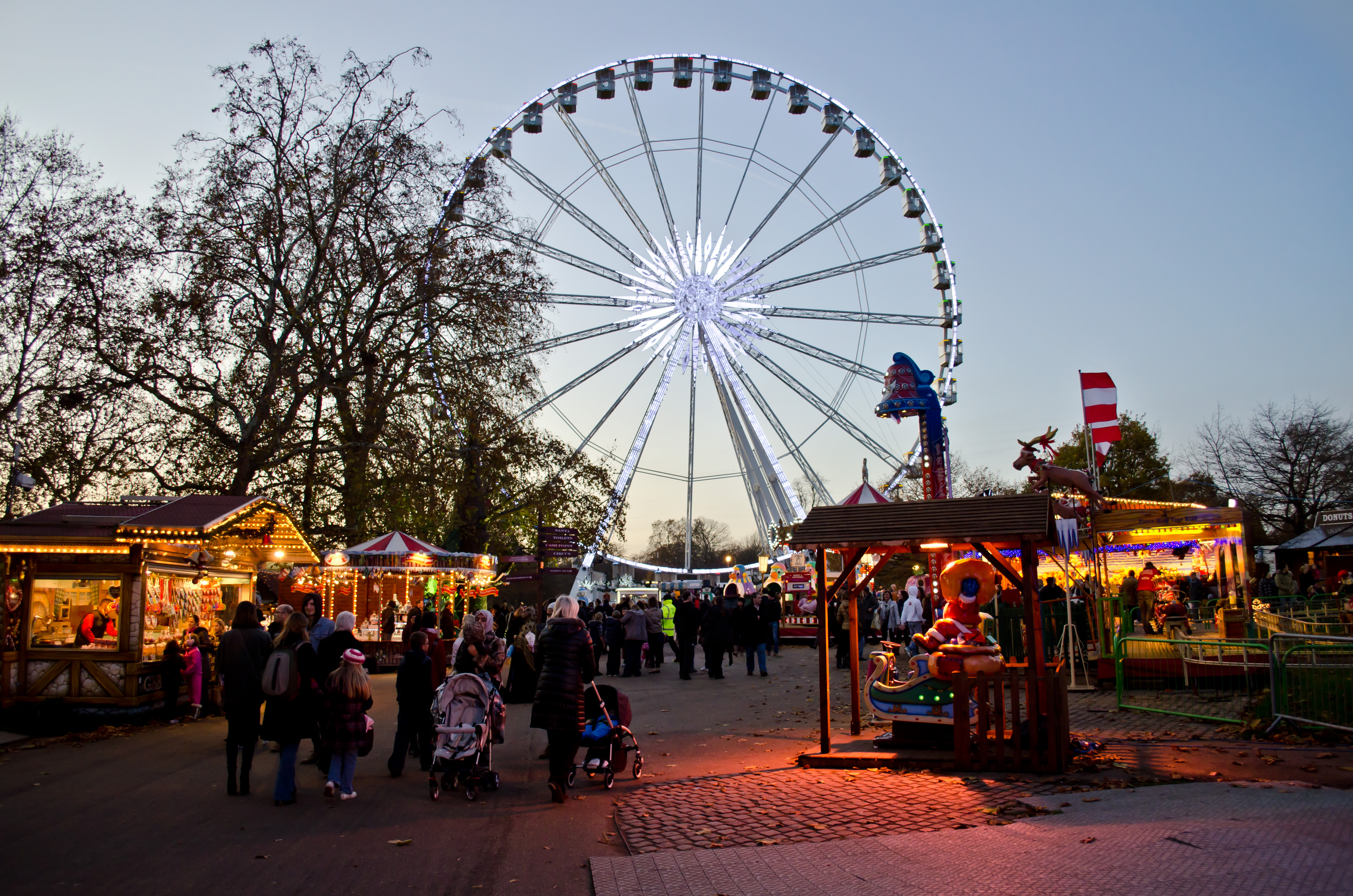 Photos taken at Winter Wonderland in Hyde Park, London, in 2011.